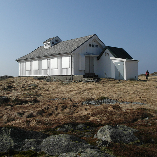 Bygningen sto ferdig restaurert utvendig i 2011. Bygget er fredet og eies av Telemuseet.